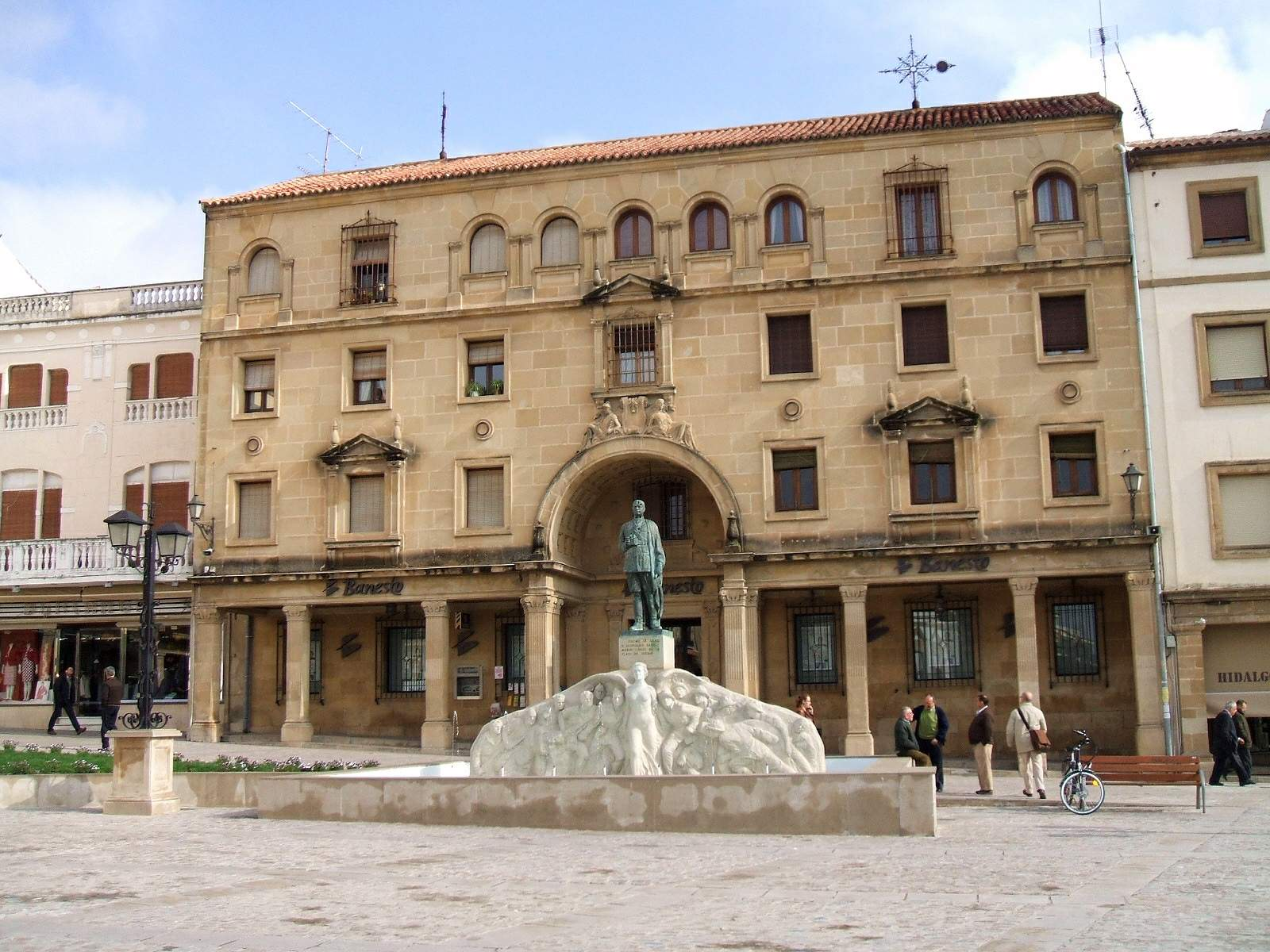 Plaza de Andalucía y Monumento al General Saro, en Úbeda (Jaén)